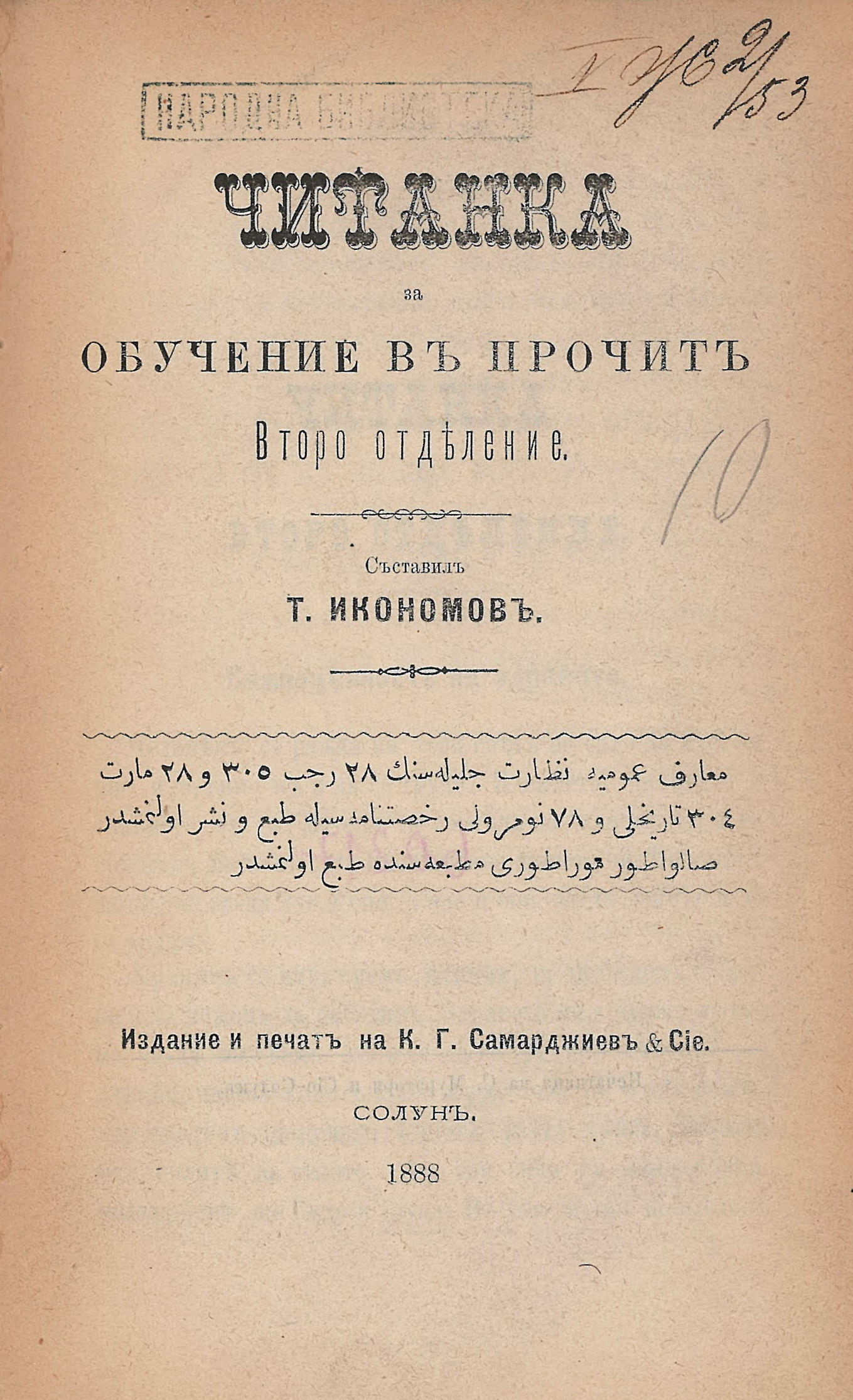 Читанка за обучение в прочит Второ отделение, издадена в Солун от книжарницата на К. Г. Самарджиев & Cиe. Тодор Поппетров Икономов